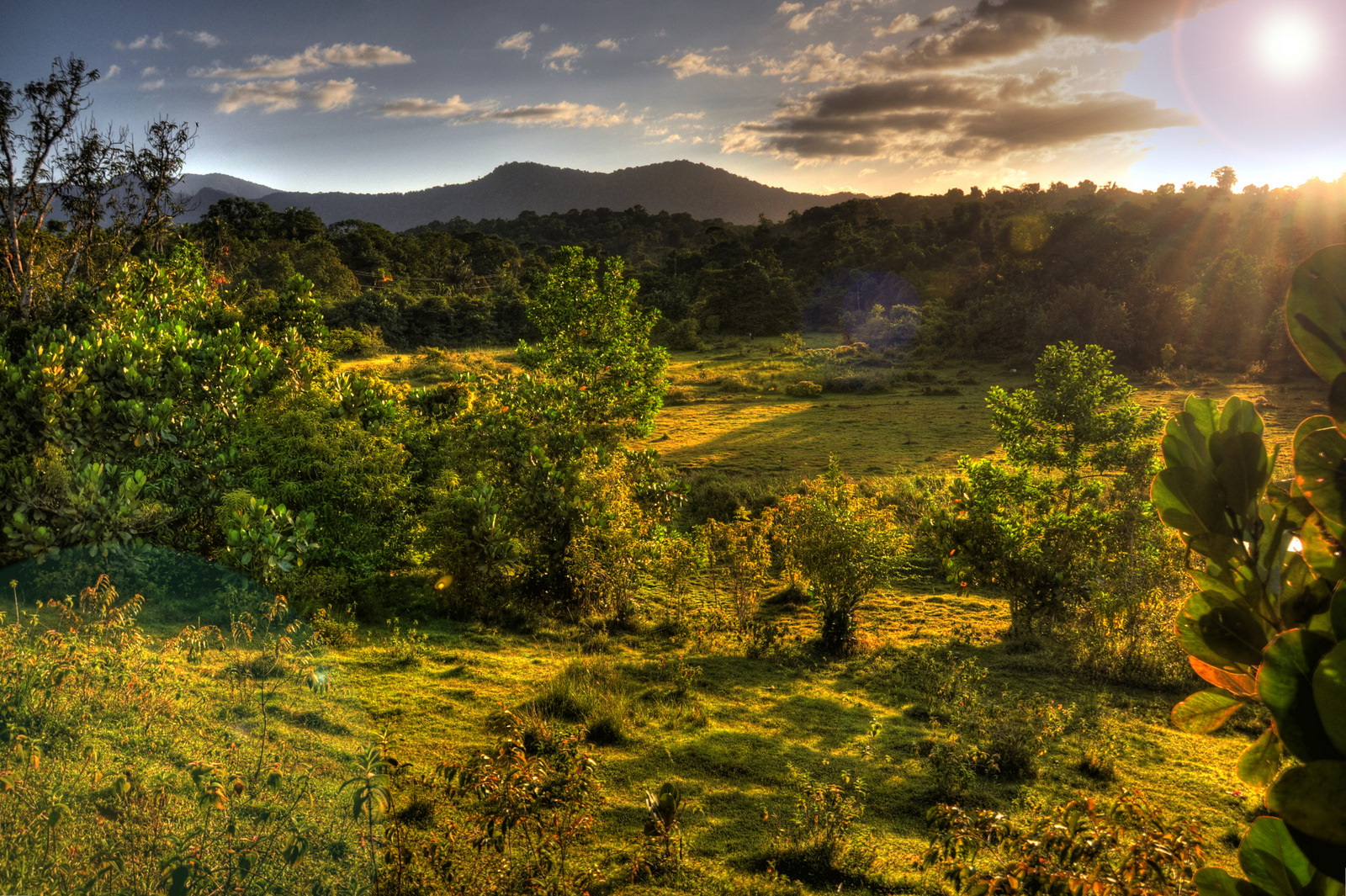 Mahdia, Guyana